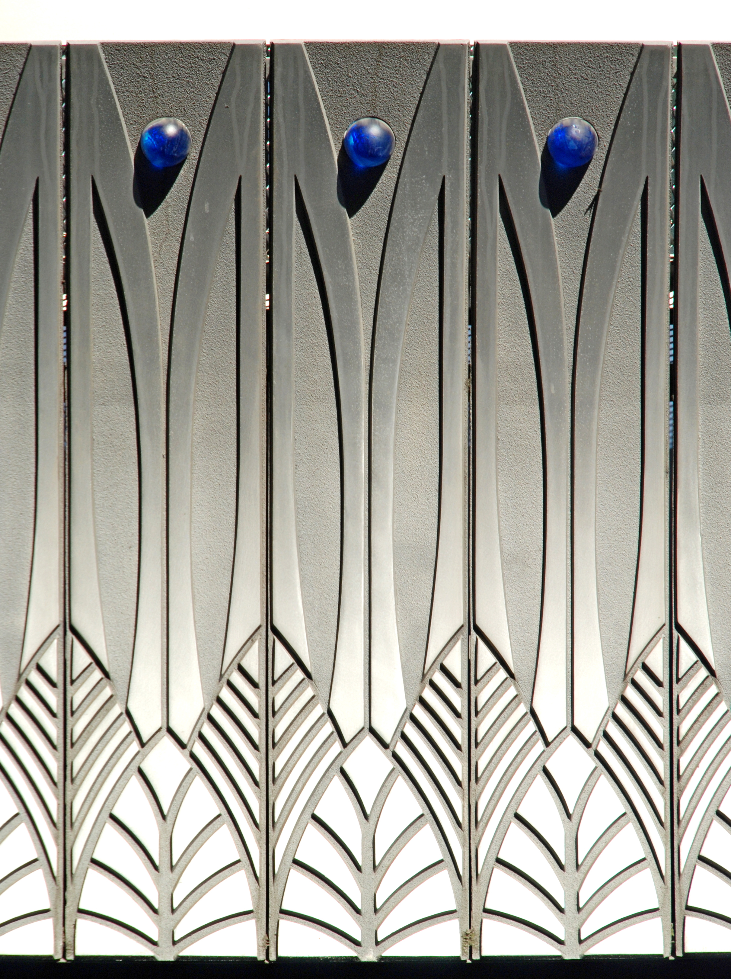 Belgique - Bruxelles - Immeuble Sapphire (Architecture postmoderne en Belgique - Atelier d'architecture de Genval - 2003) This photo of immovable heritage has been taken in the Brussels Capital Region